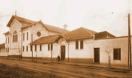 En 1868, religiosas españolas forman el primer colegio en Providencia, hermoso edificio de adobe y madera con sus patios de palmeras y castaños.